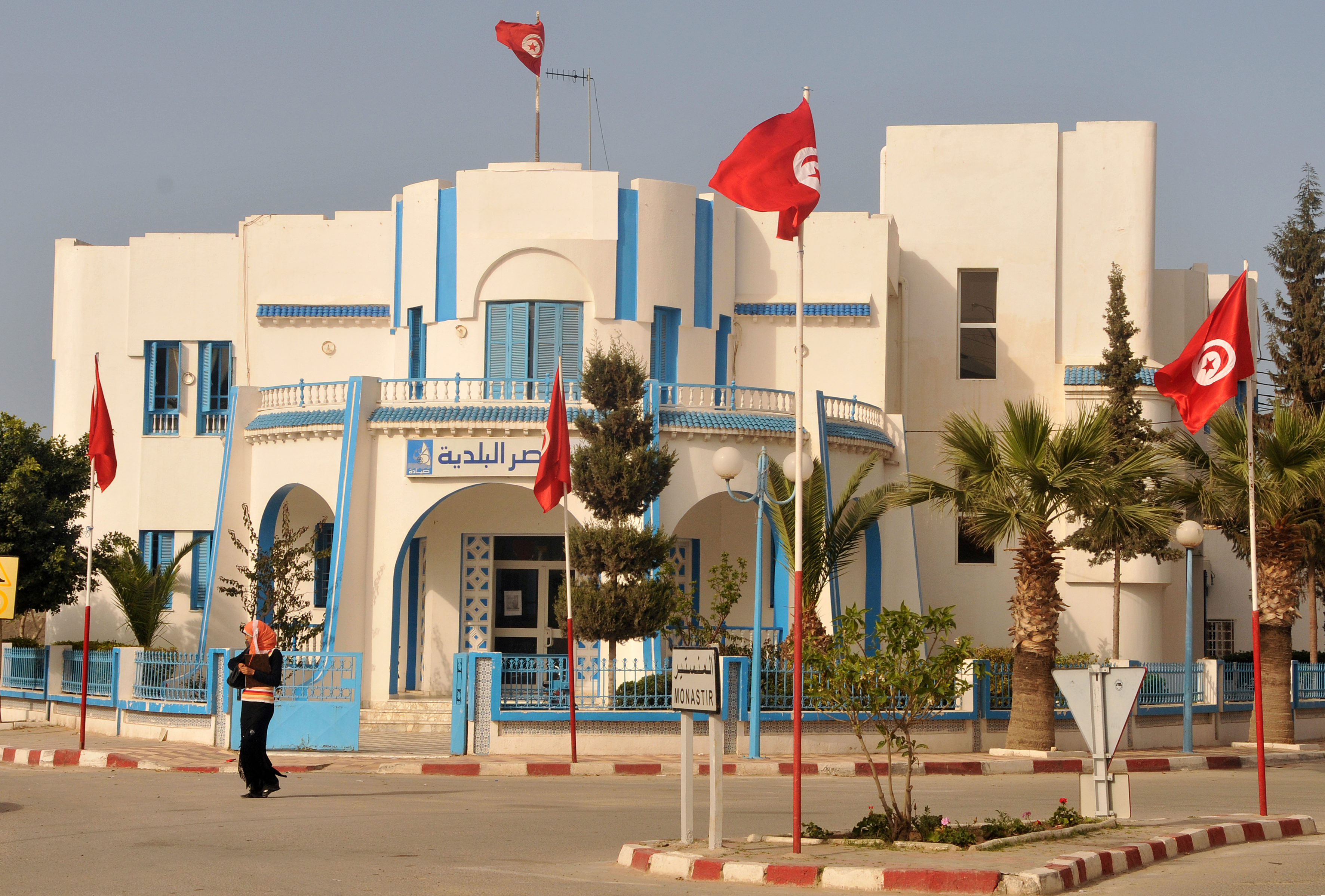 Hotel de ville de Sayada dans le gouvernorat de Monastir, Tunisie